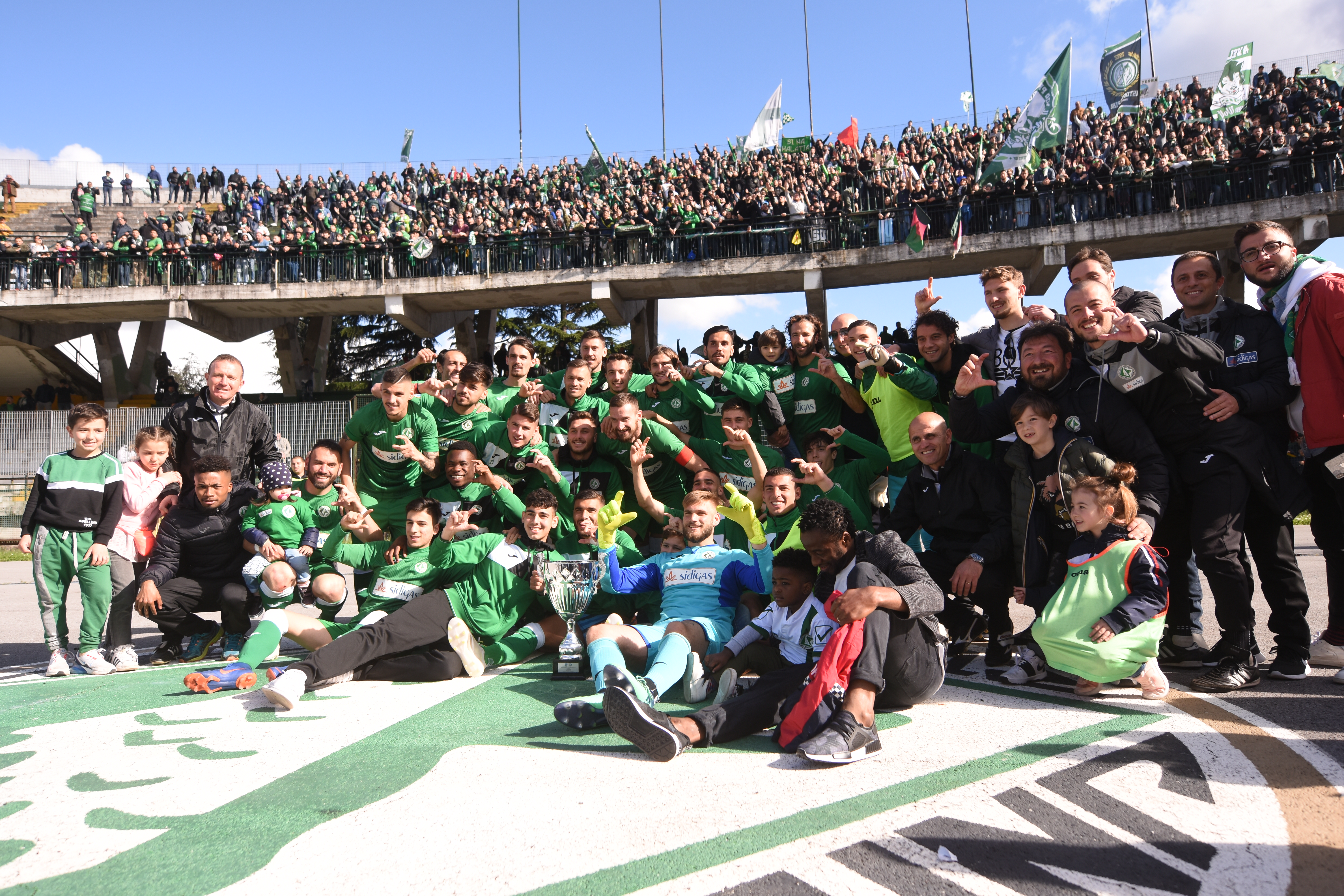 La squadra in festa sotto la curva sud dello Stadio Partenio-Lombardi dopo la premiazione